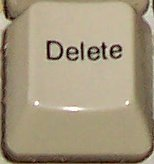 Delete key on PC keyboard